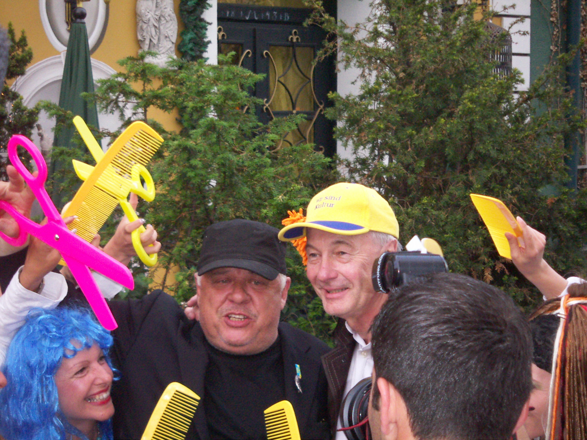 Erich Joham und Karlheinz Hackl feiern 60 Jahre im Marchfelderhof in Deutsch Wagram